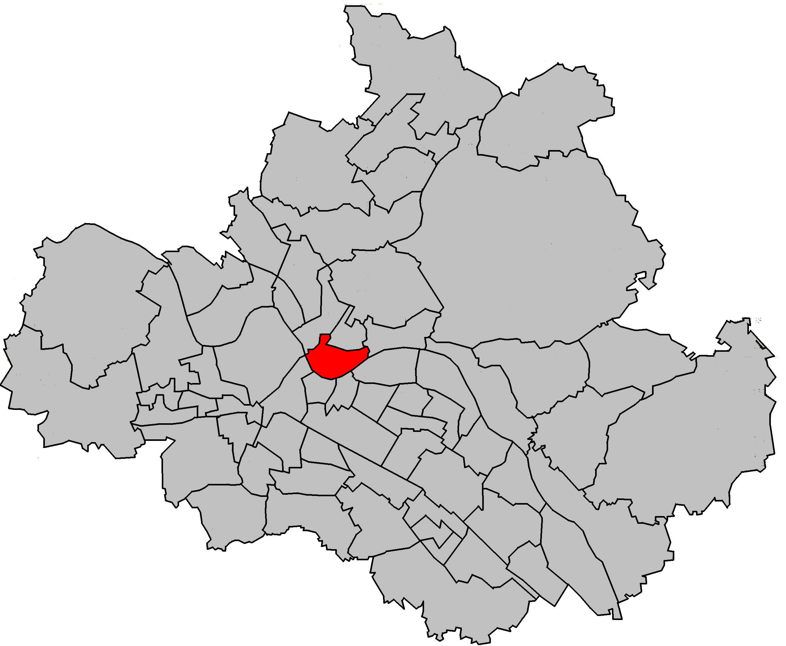 Innere Neustadt, statistischer Stadtteil von Dresden